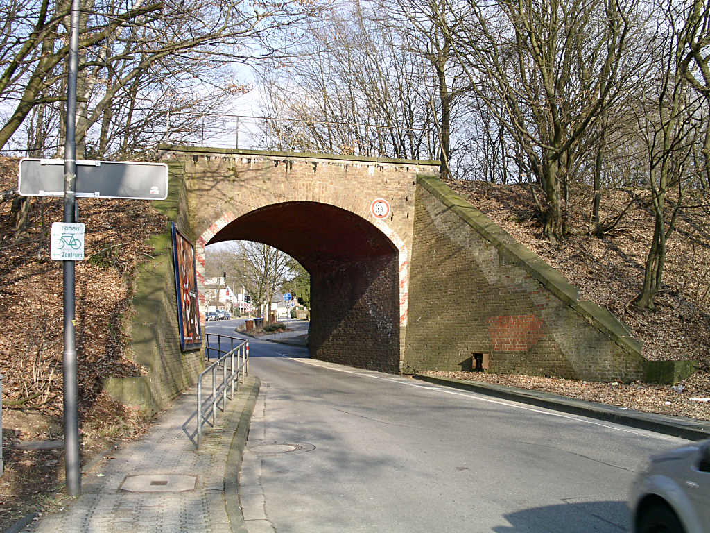 Bensberg – railway embankment